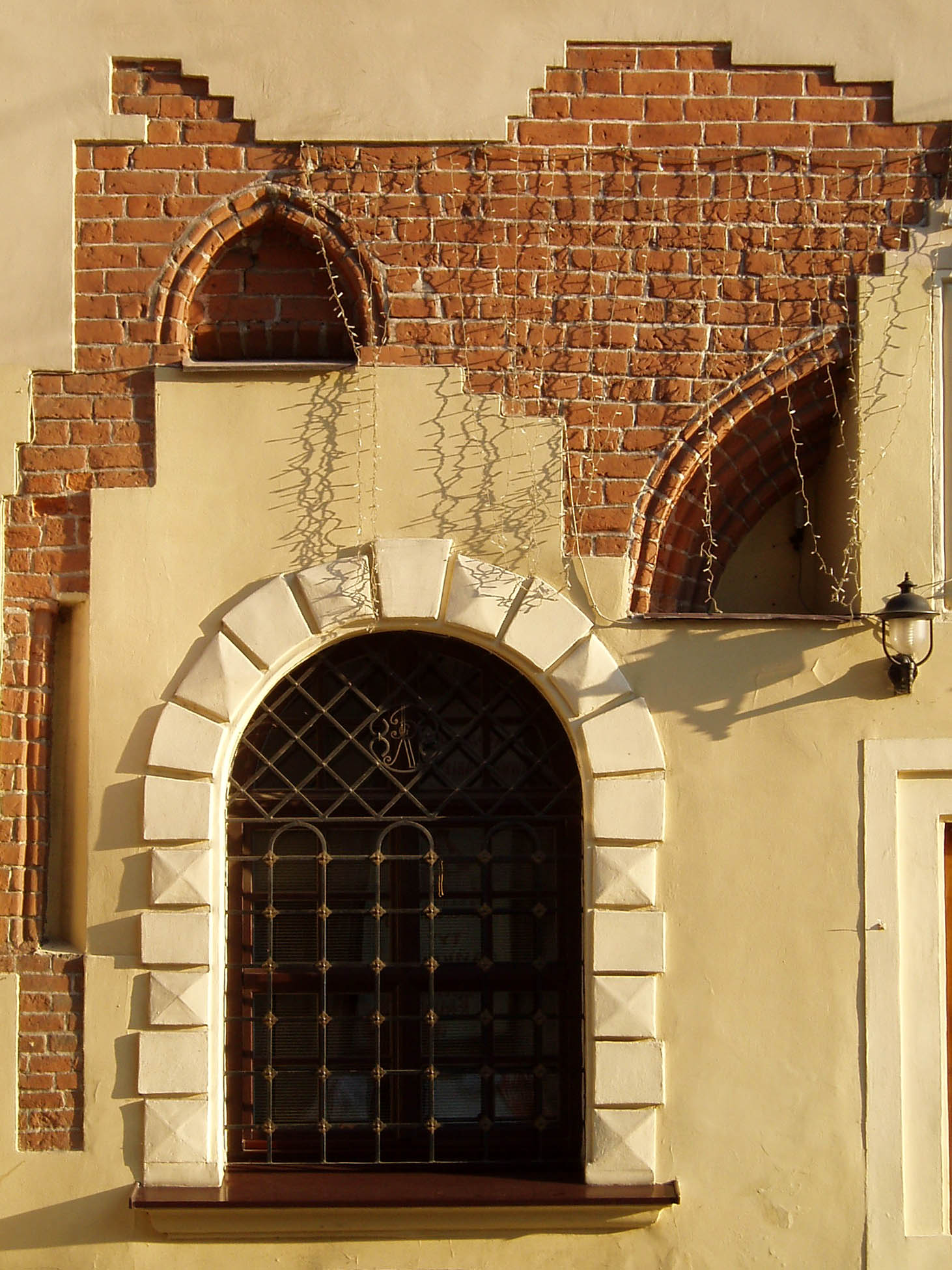 Зондаж на стіні будинку № 2 на вулиці Руській у Львові.